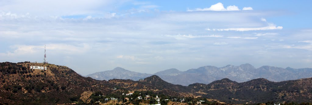 Aussicht in die Hollywood Hills, Los Angeles